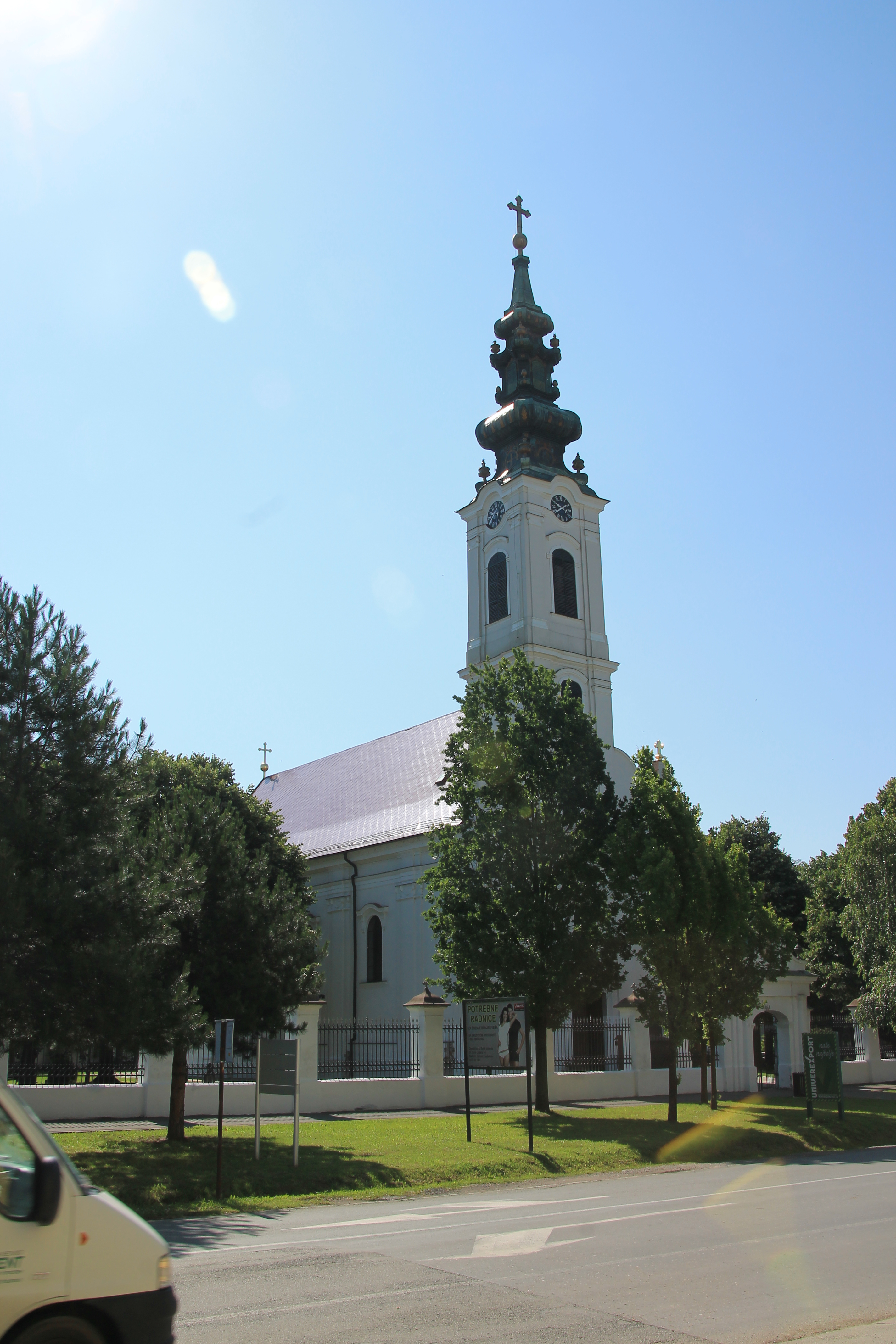 Crkva Sv. Jovana Krstitelja (Bačka Palanka)